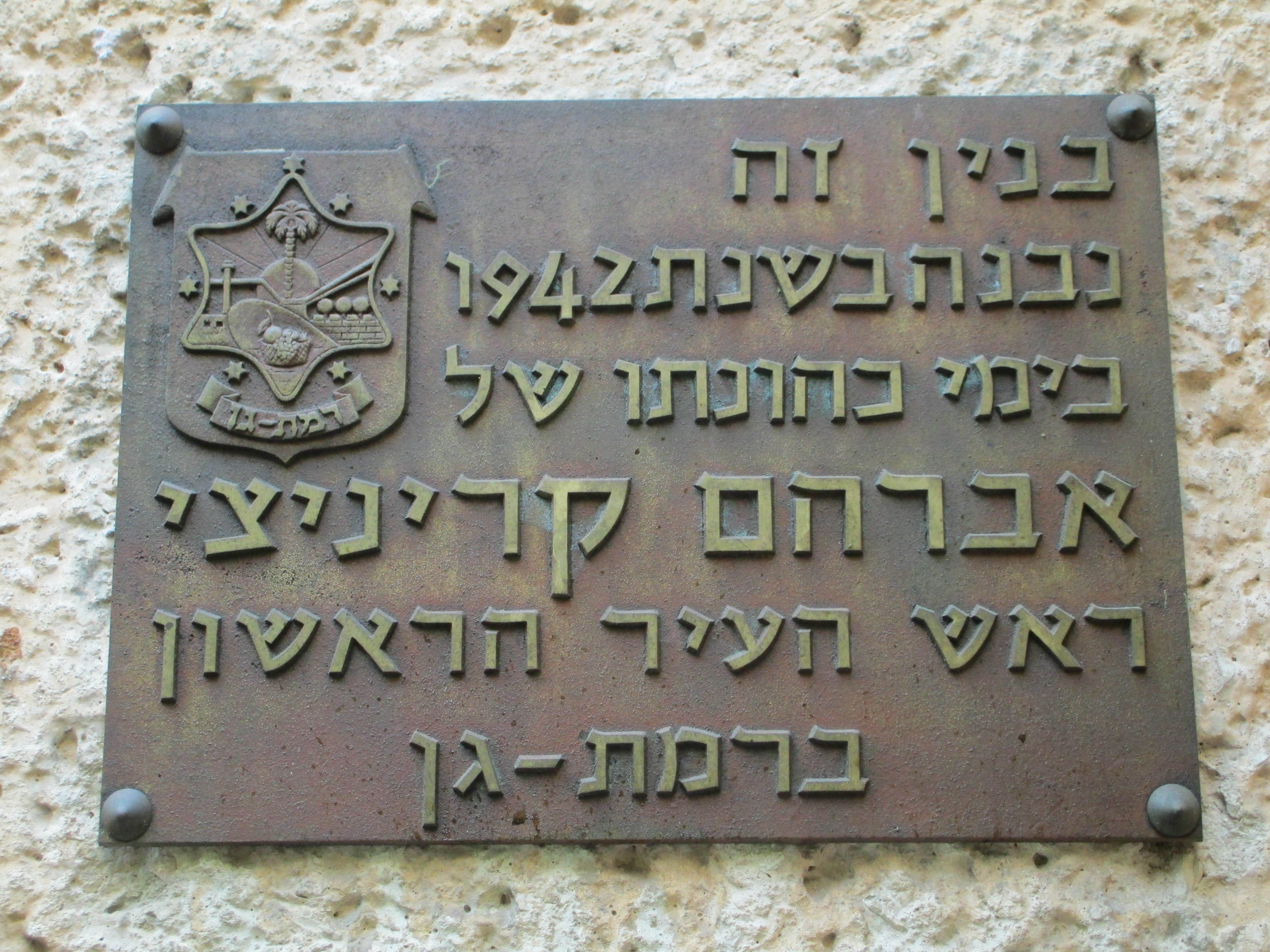 לוחית זיכרון בכניסה לעיריית רמת גן